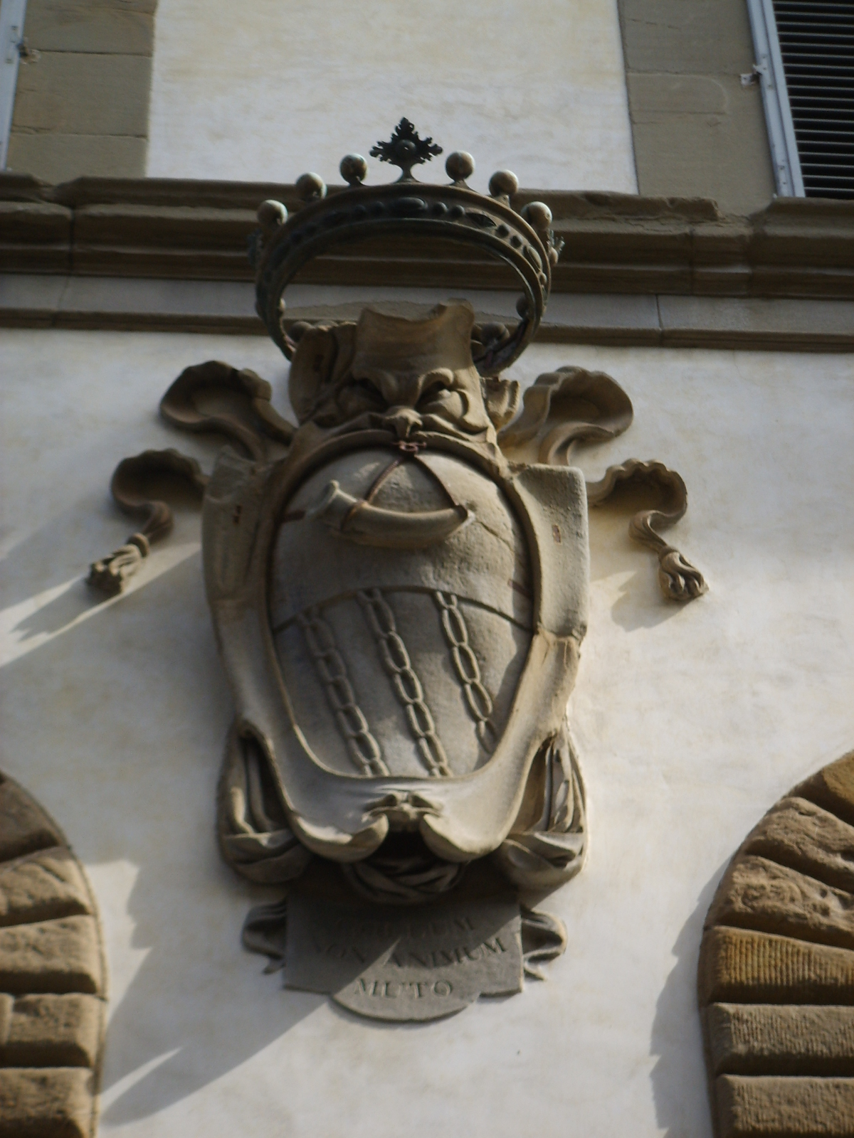 Palazzo gerini 04 stemma